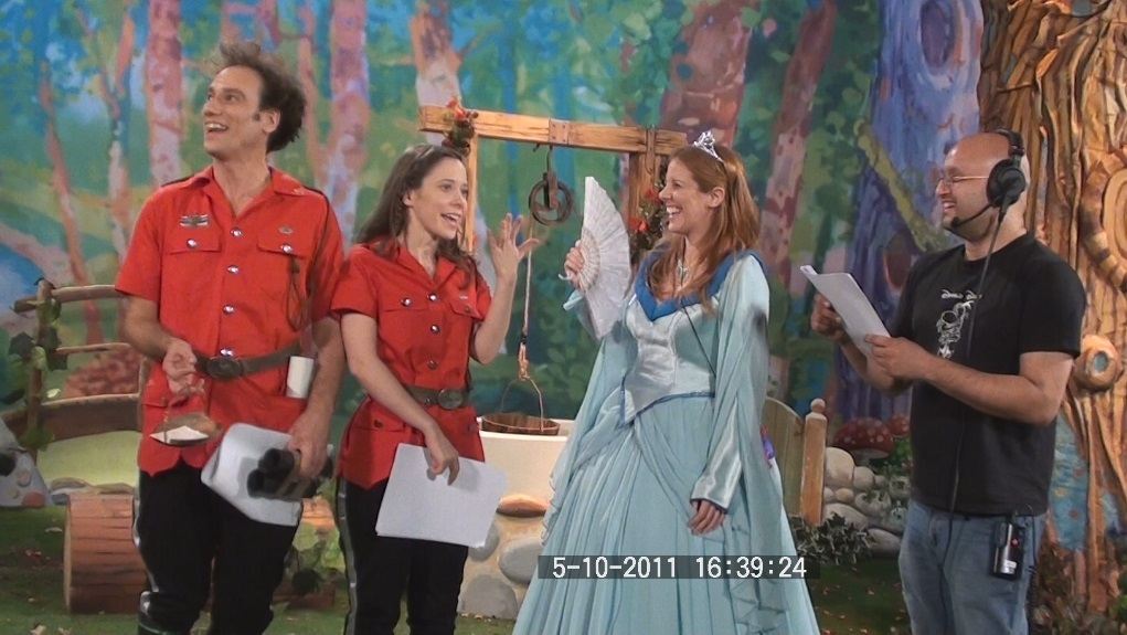 תעלומות מהאגדות - אלון גור אריה, קרן שניוק, אביגיל ערמון לוי, תומר שרון